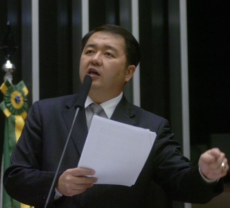 Deputado William Woo